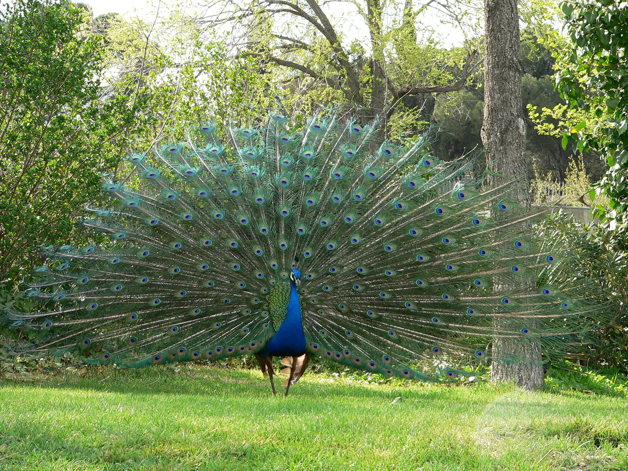 cc-by-3.0